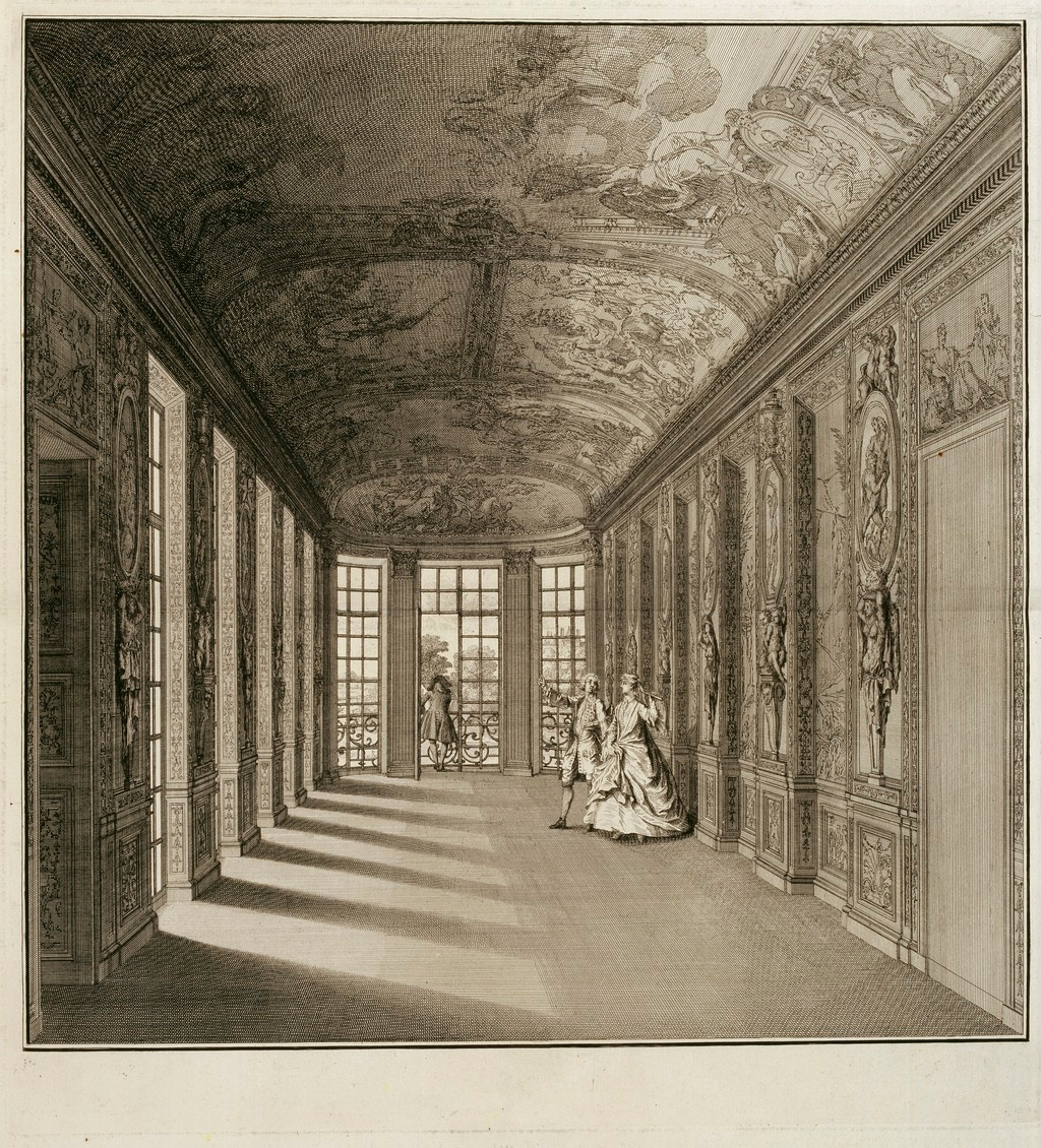 Bernard Picart - Galerie d'Hercule de l'hôtel Lambert (Paris), avec sa décoration par Lebrun. Gravure au burin.